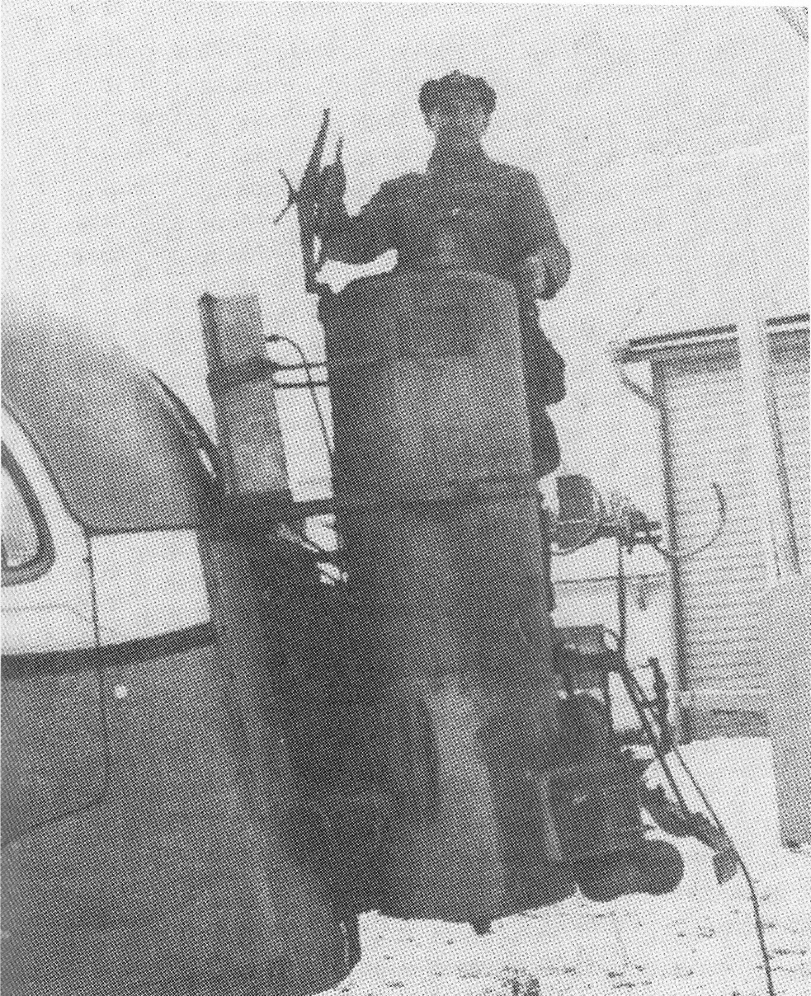 Jooseppi Vainio täyttää häkäpönttöä 1940-luvulla.